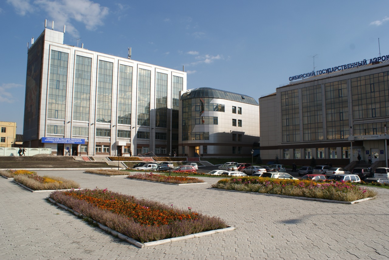 Корпус H СибГАУ